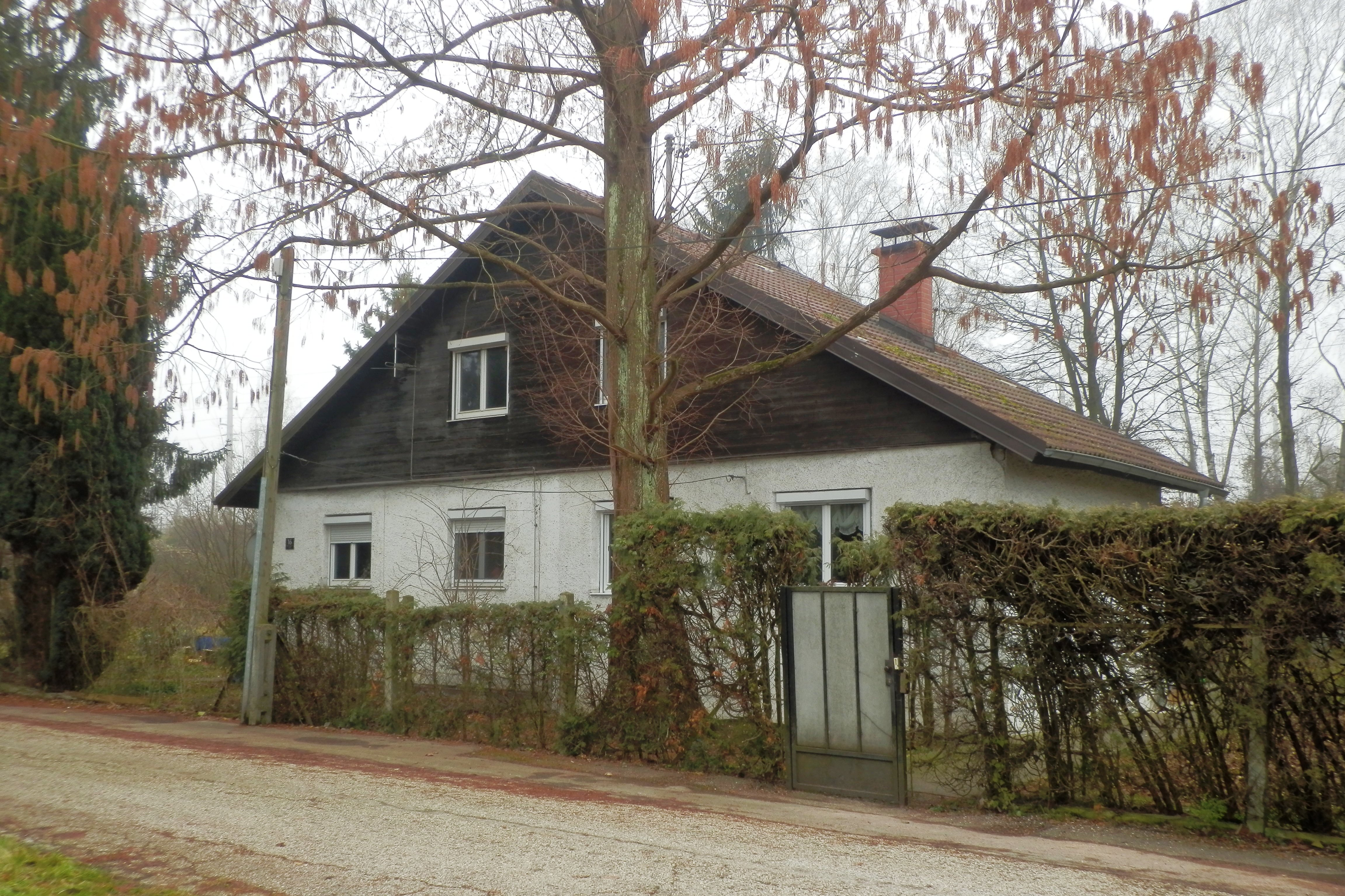 Linz, Wahringerstraße 14-16. Letztes erhaltenes Haus der Ing.-Demant-Siedlung Kleinmünchen.